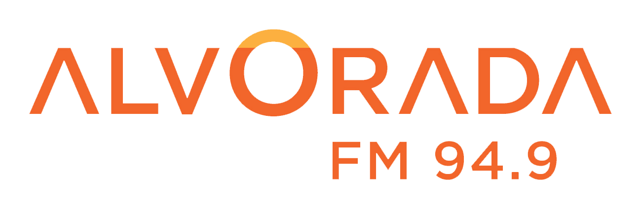 Logotipo da Rádio Alvorada FM, rede de rádio regional que opera no estado de Minas Gerais, Brasil.